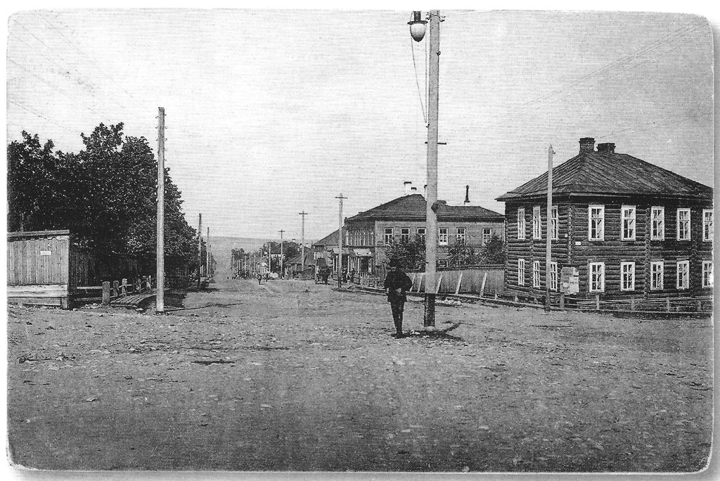 Бородинская ул. (ныне пр.Ленина)